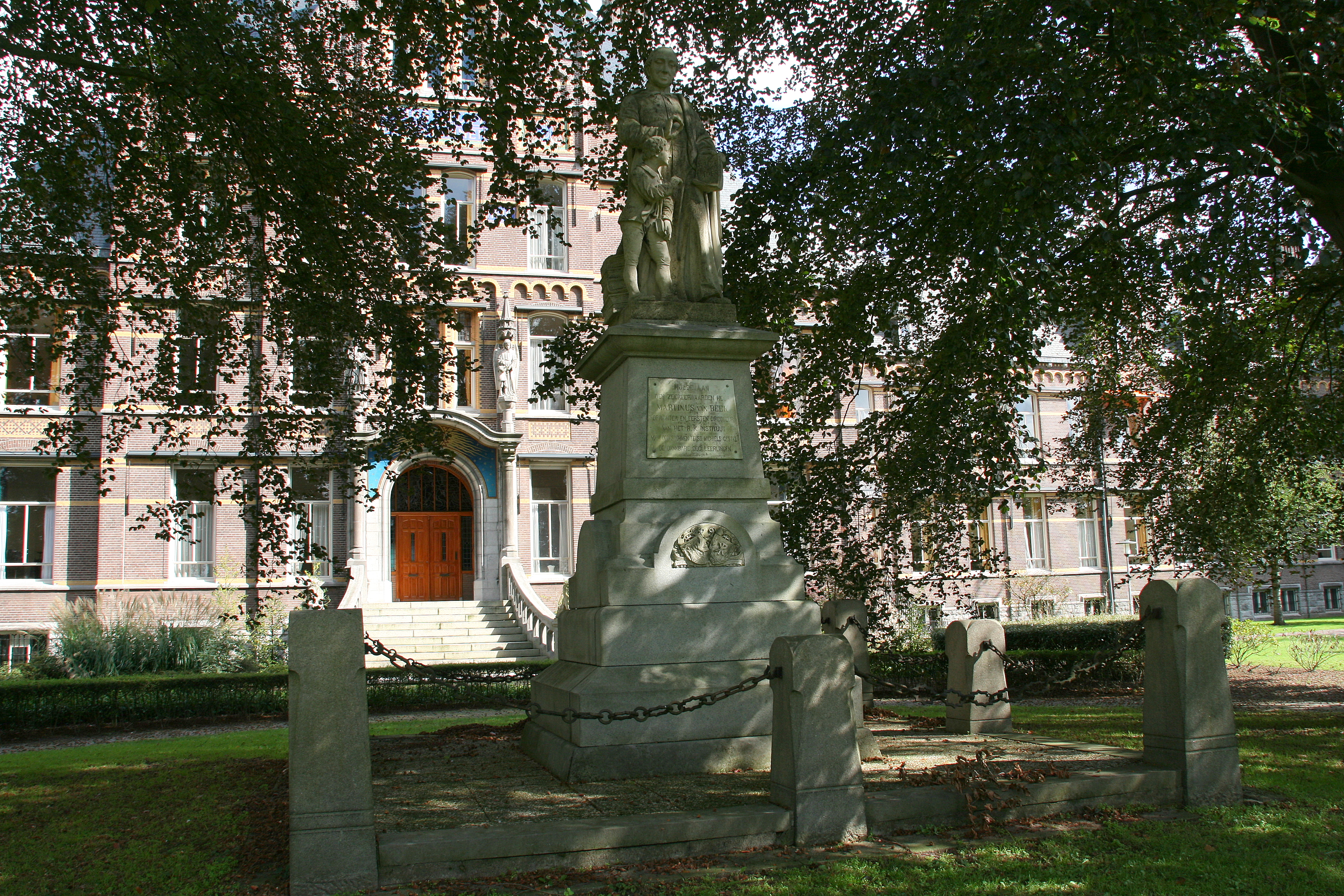 Sint Michielsgestel - Theerestraat 42 - Martinus van Beek